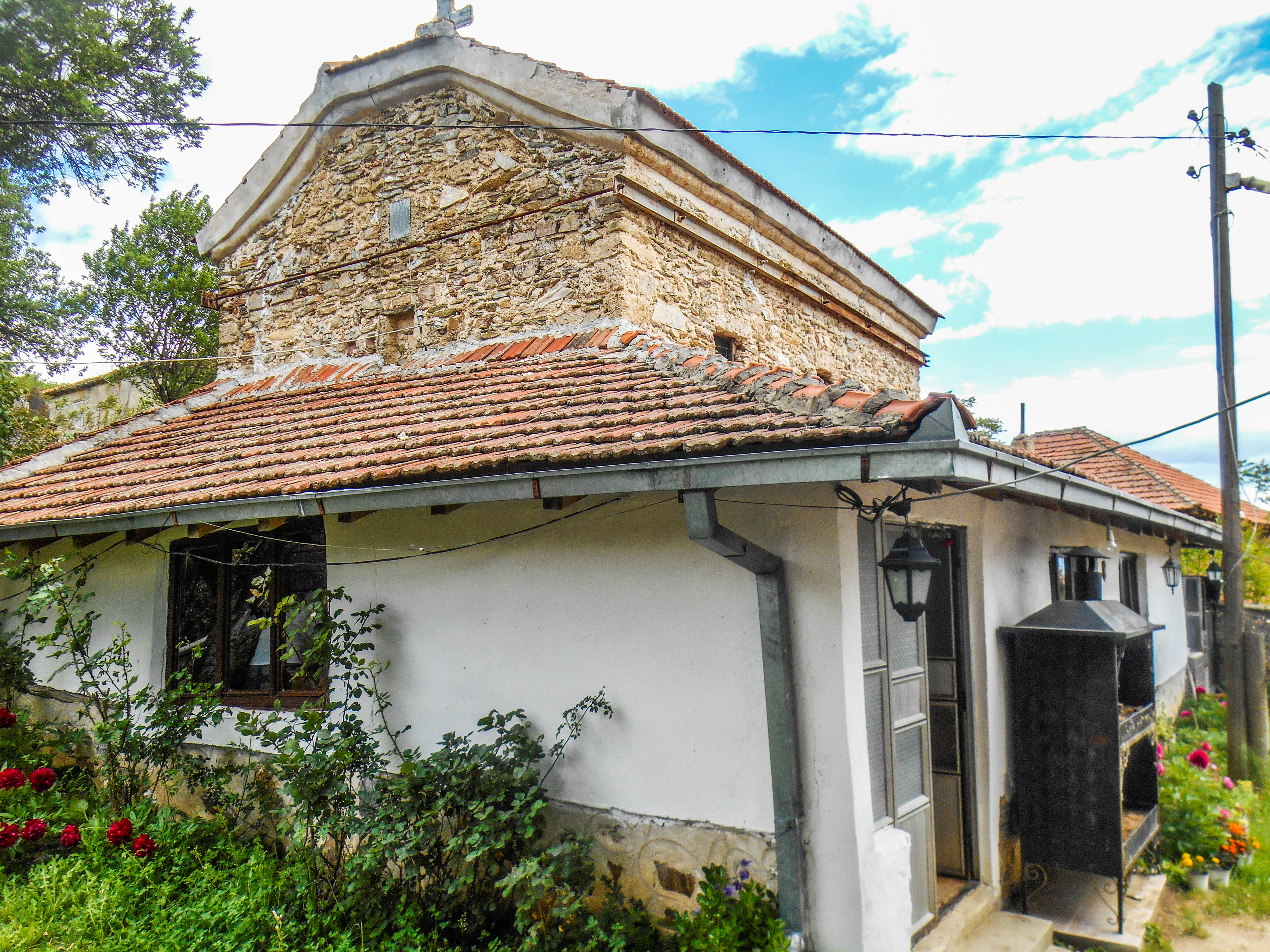 Црква „Св. Петка“ - Требичино